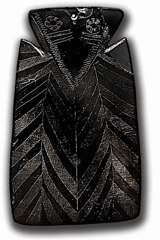 Ídolo grabado sobre esquisto de la Granja de Céspedes (España)